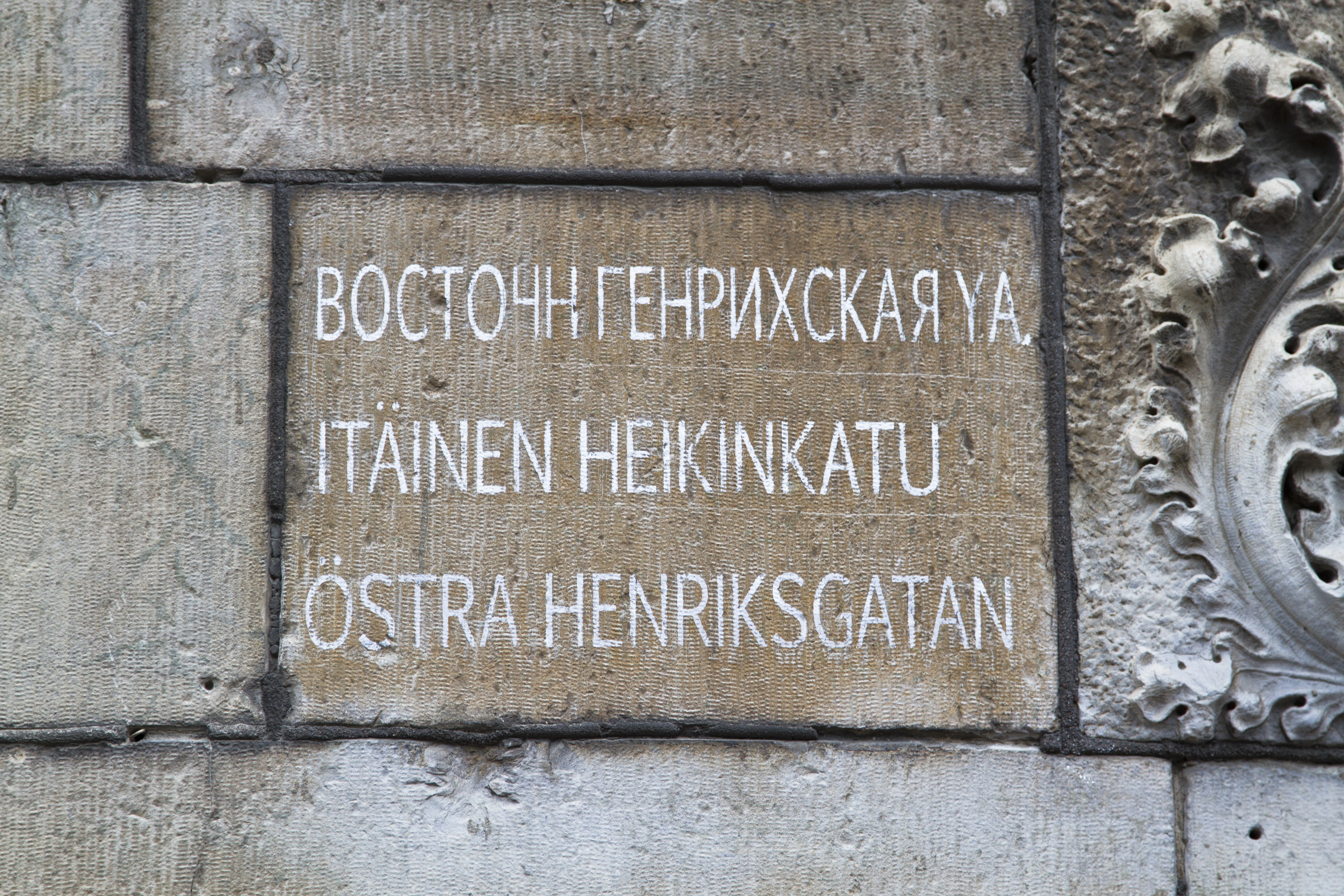 Itäinen Heikinkatu -kyltti Argoksen talon kiviseinässä.